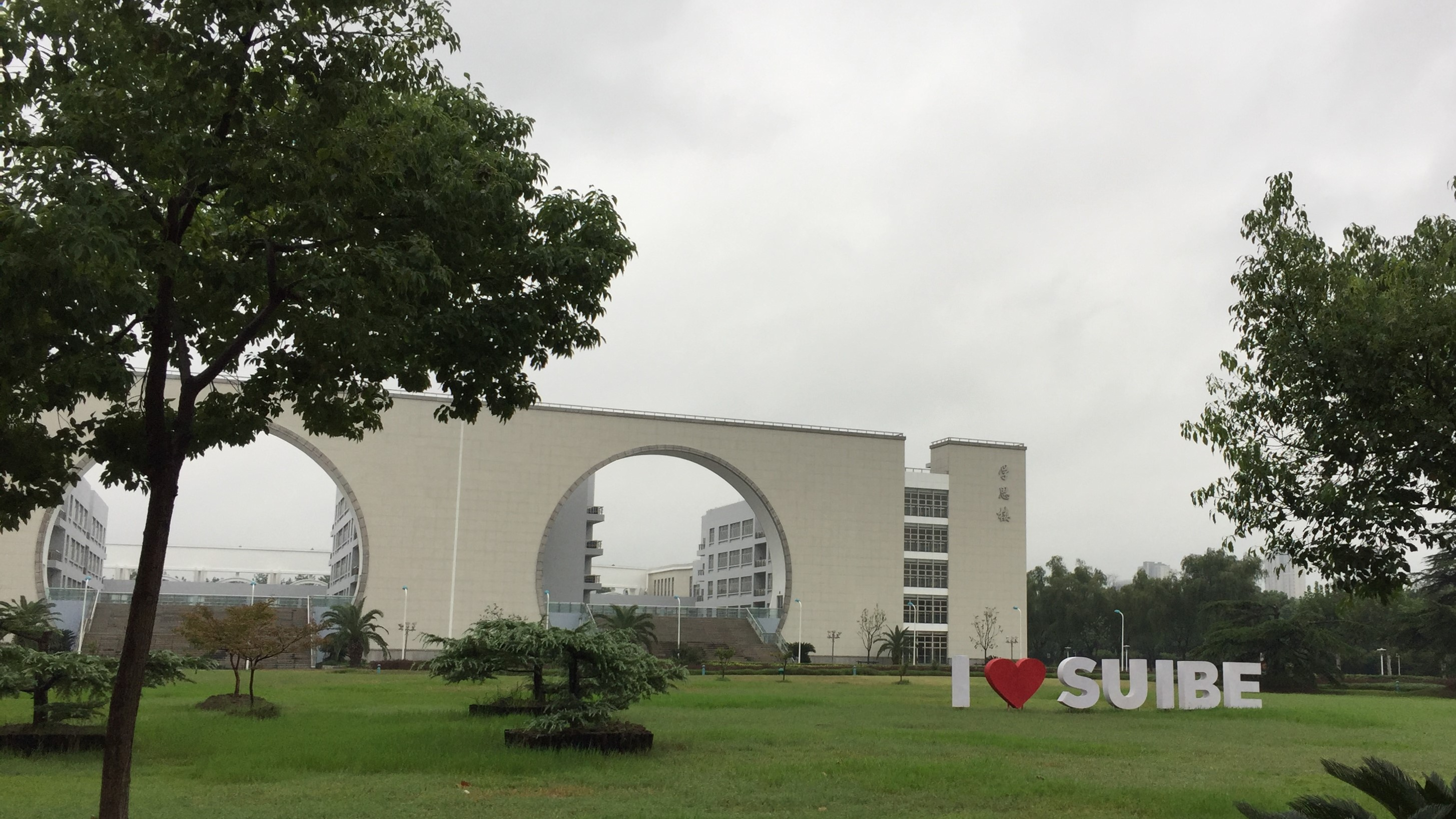 Campus photo of SUIBE